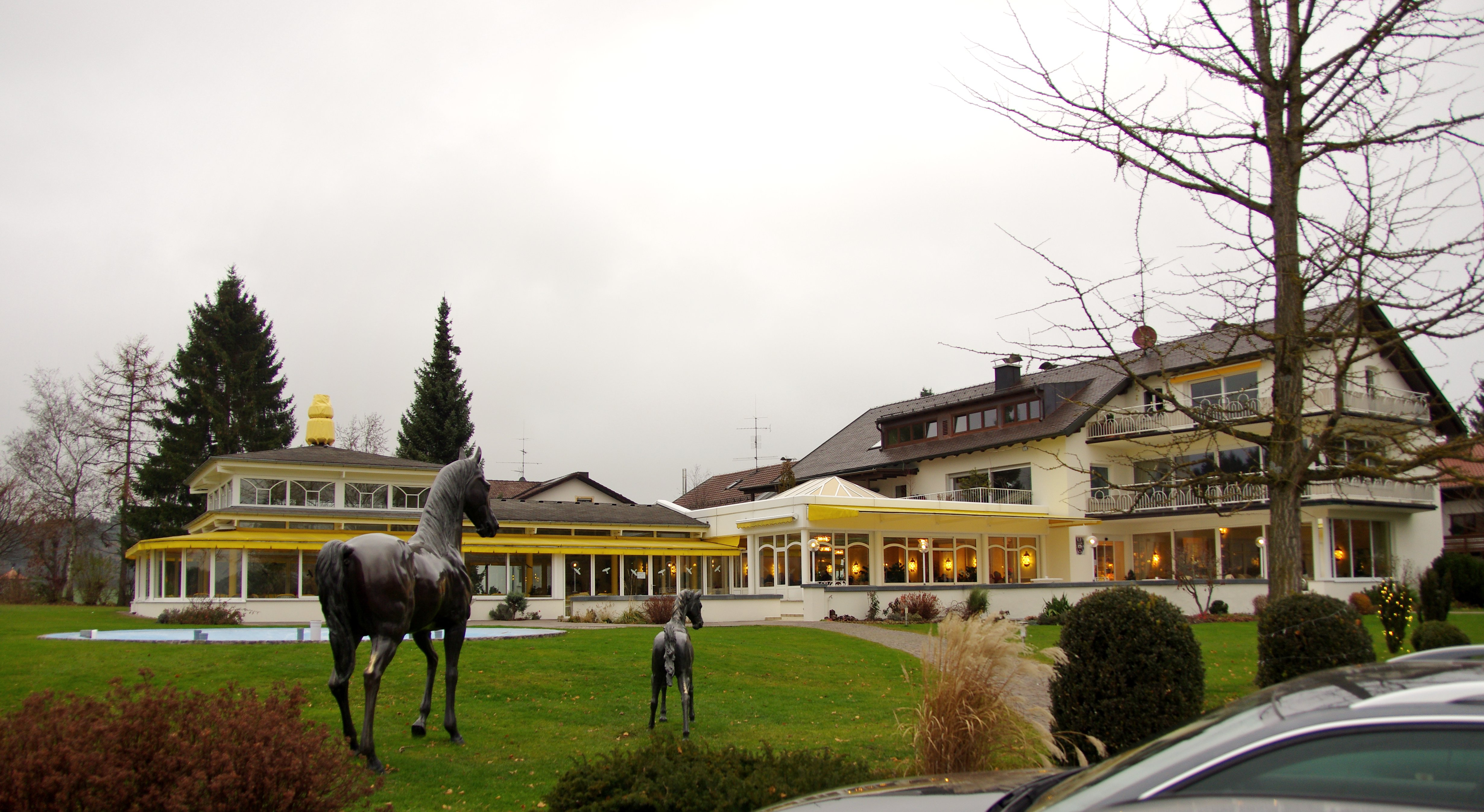 Das Kaffee Schwermer in Bad Wörishofen